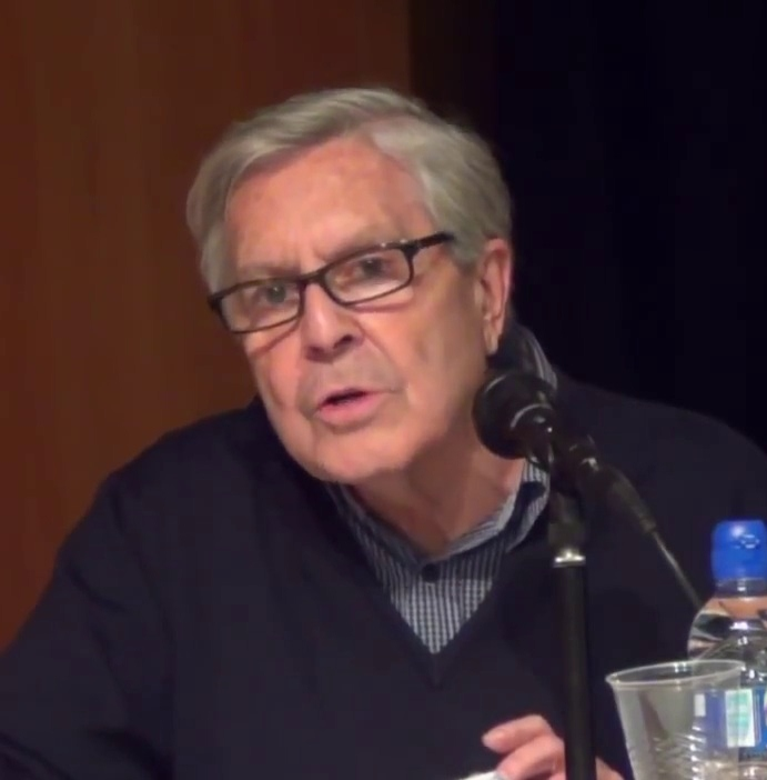 Carlos Jiménez Villarejo marzo de 2014).